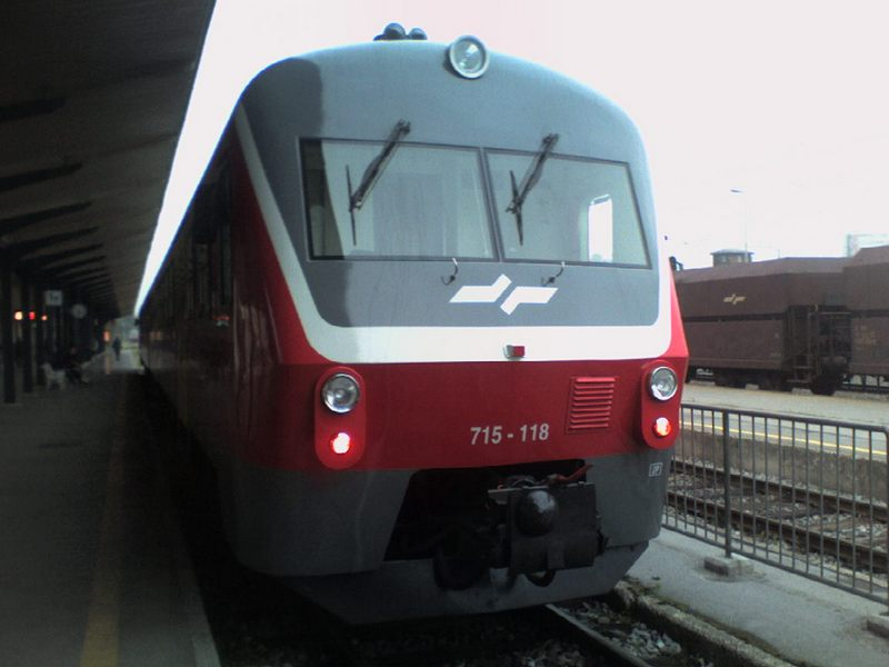 A Slovenian 715 series train in Ljubljana, Slovenia